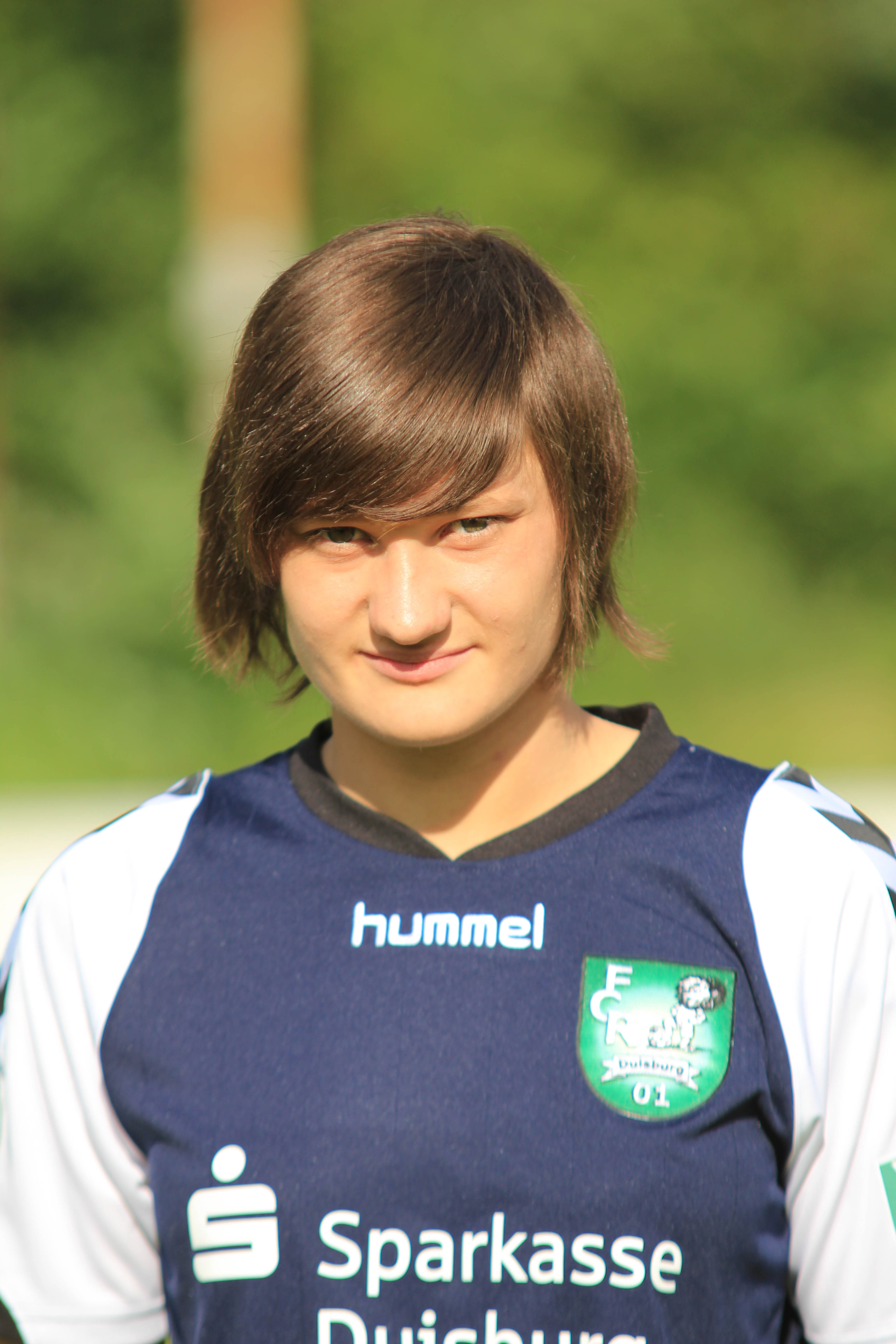 Chiara Kirstein, FCR 2001 Duisburg